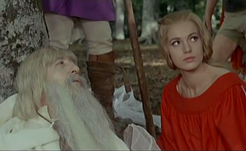 Screenshot from L’armata Brancaleone directed by Mario Monicelli